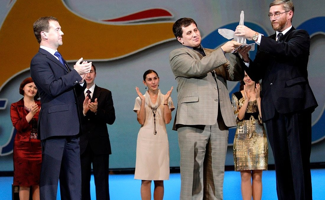 Вручение победителям Всероссийского конкурса «Учитель года – 2010» преподавателю биологии и химии из Тульской области Андрею Гарифзянову (слева) и преподавателю математики из Москвы Михаилу Случу (справа) главного приза – «Большого хрустального пеликана».